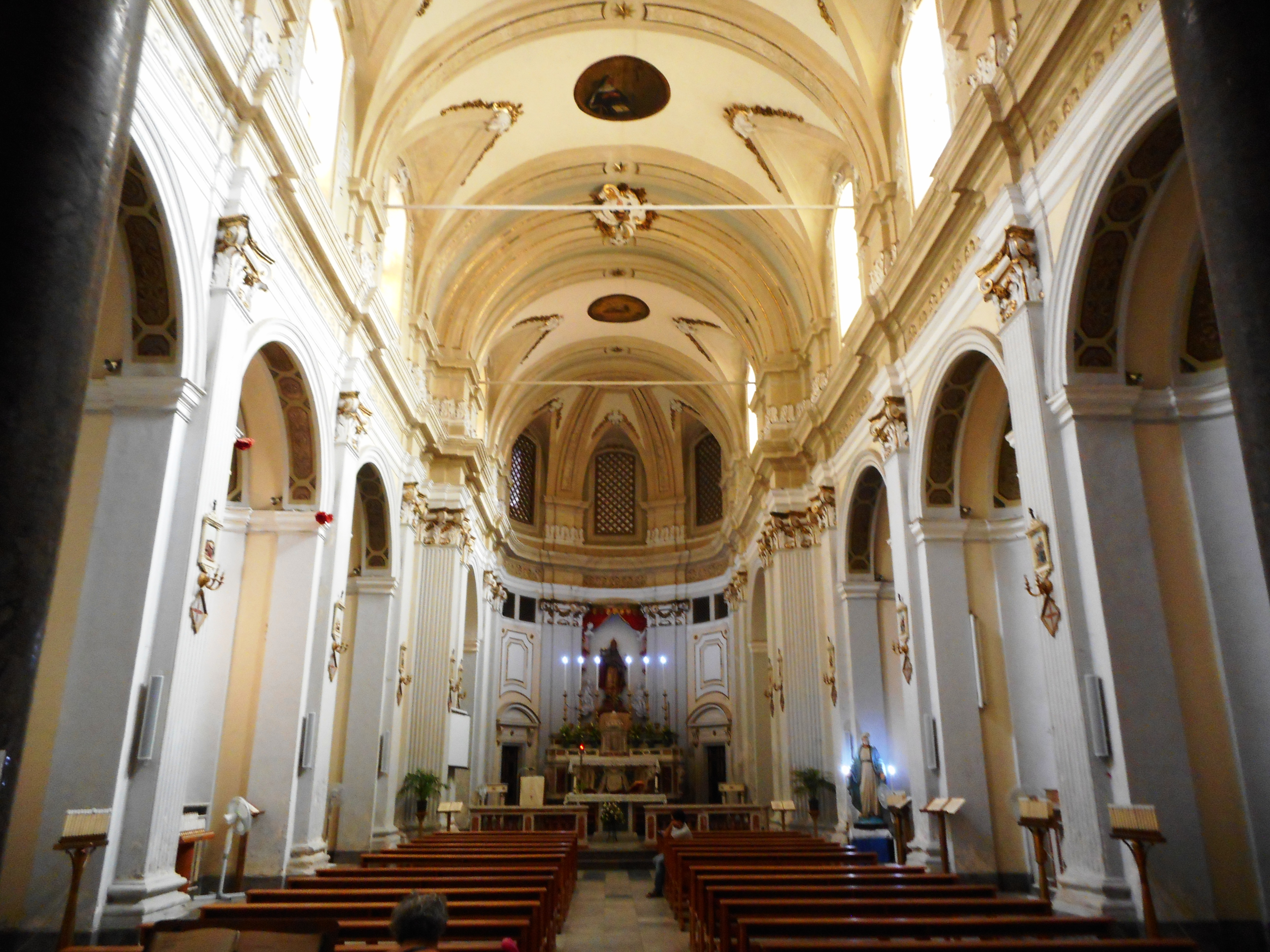 Interno della chiesa di San Gregorio Papa